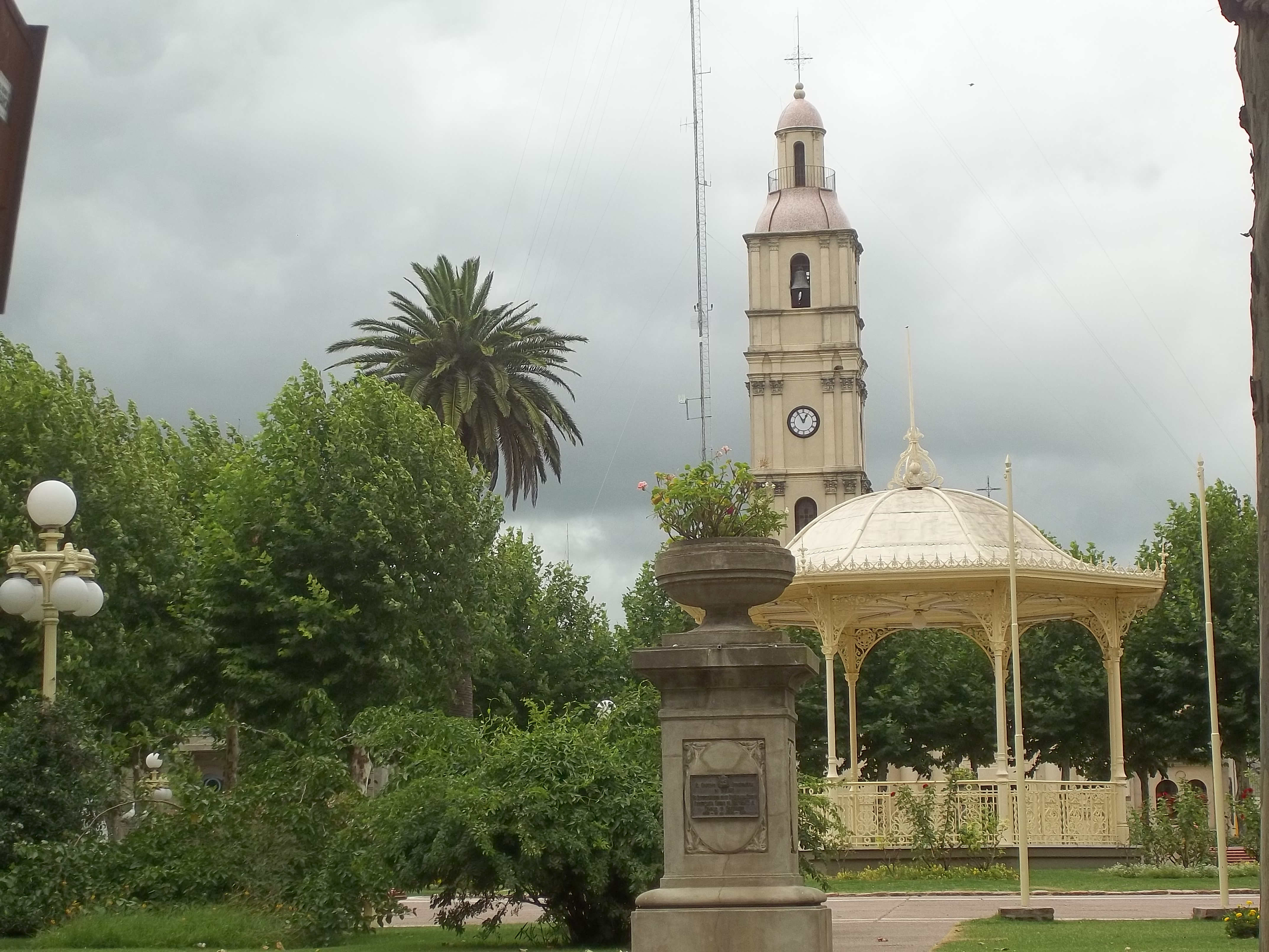 Quiosco - glorieta. Ubicada en el departamento de Río Negro